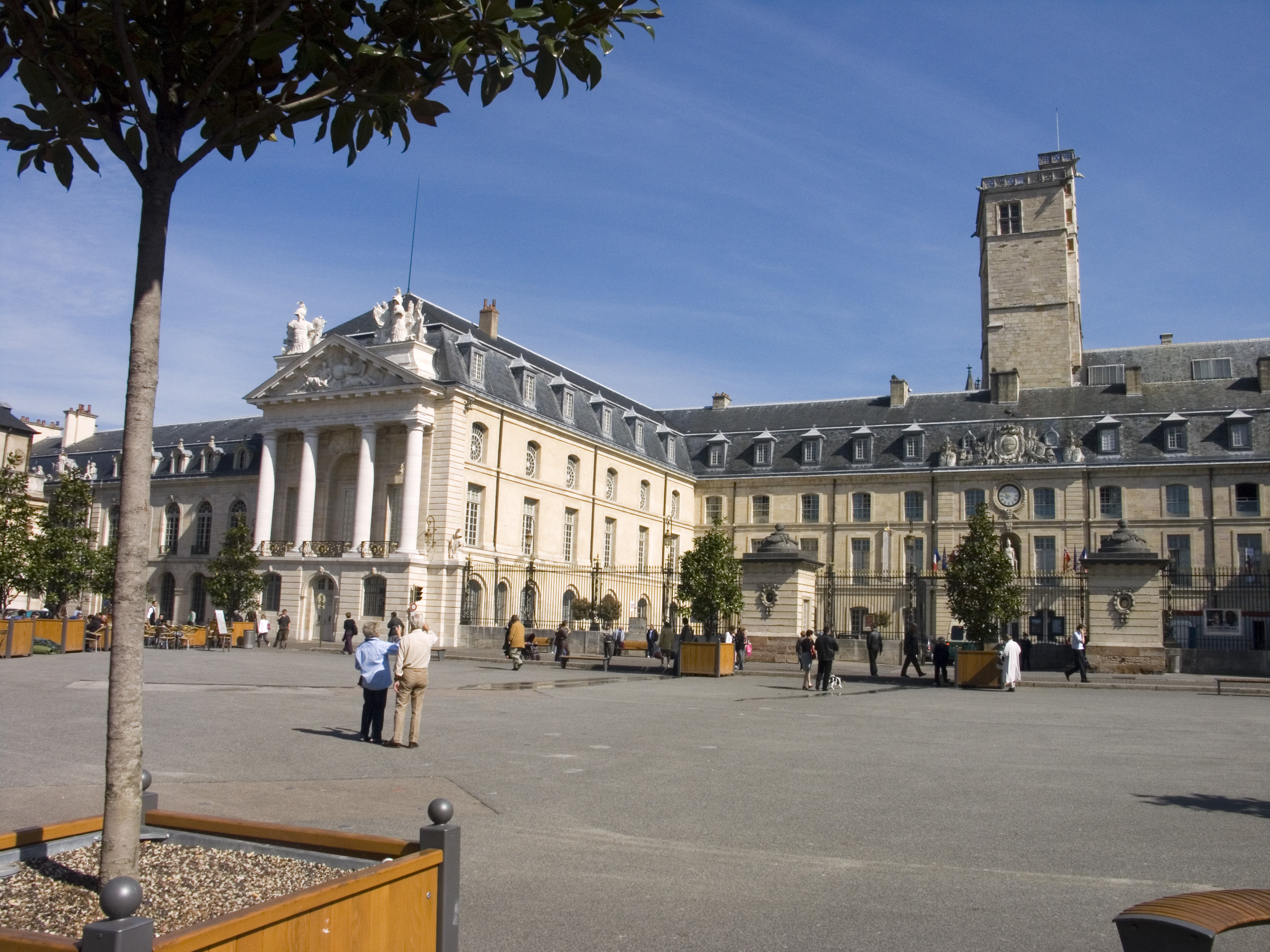 Palais des ducs de Bourgogne à Dijon